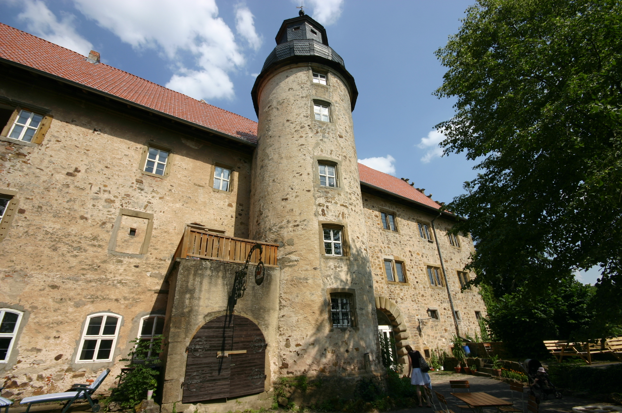 Blick auf die Bettenburg vom kleinen Park aus gesehen